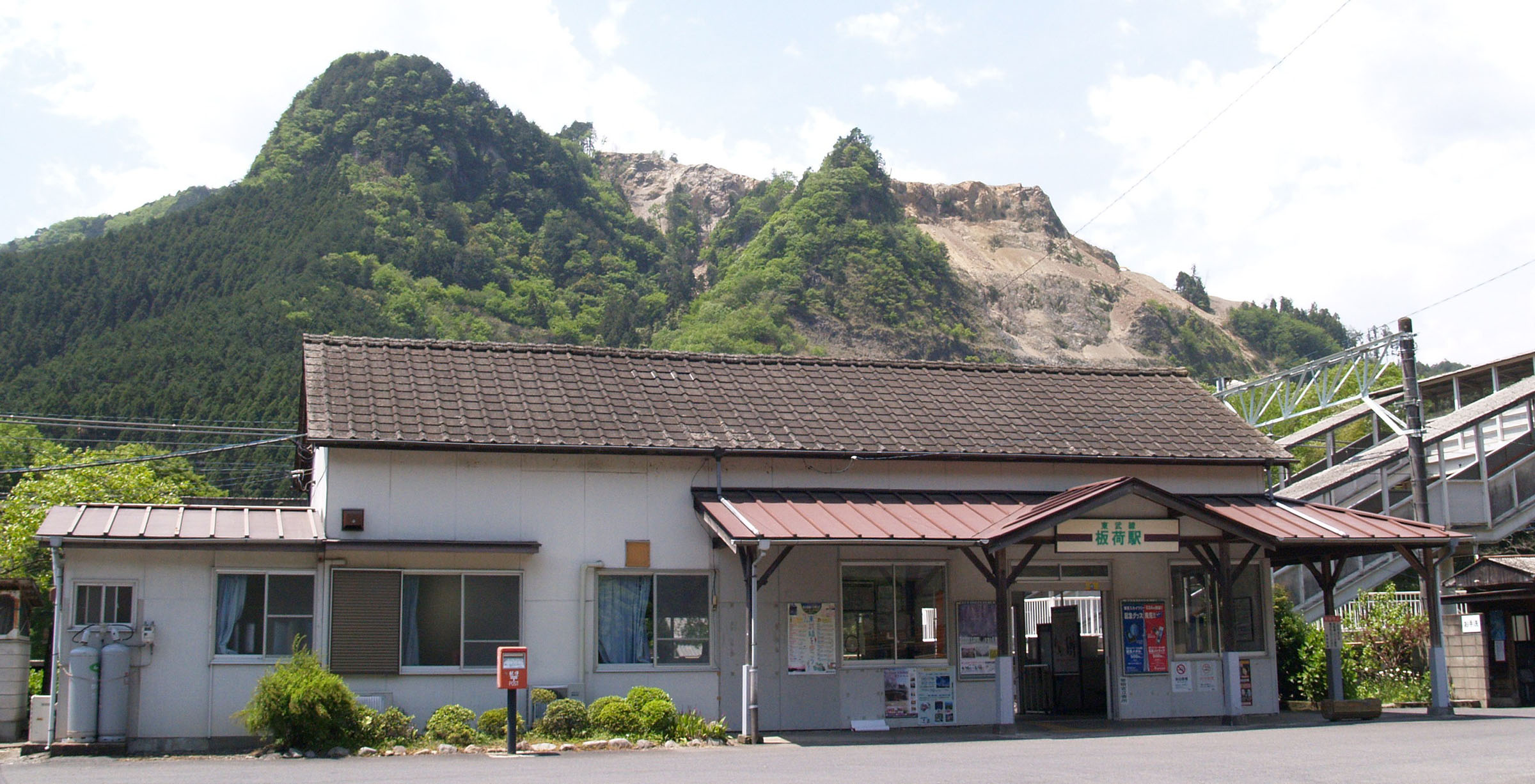 板荷駅